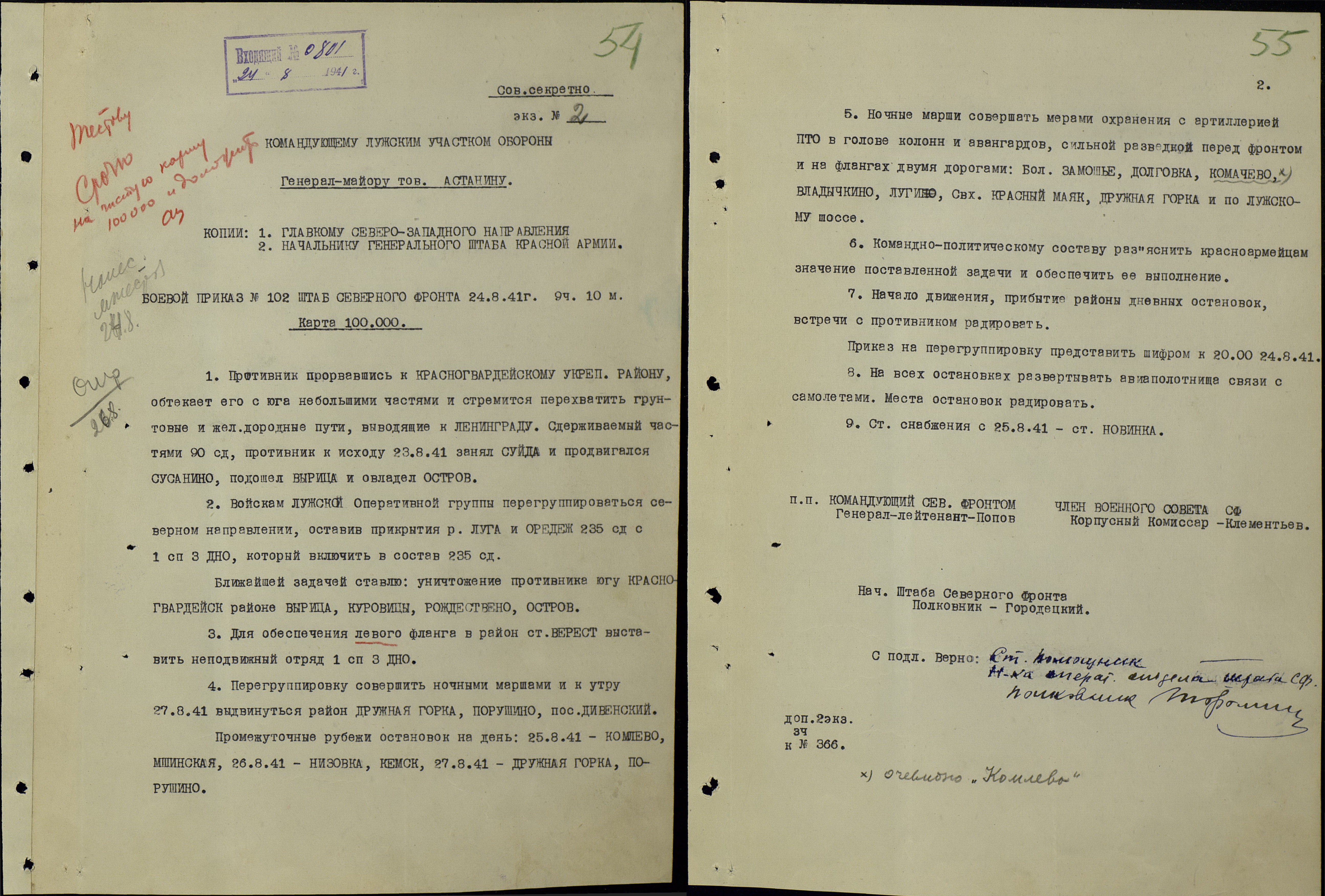 Боевой приказ №102 штаба Северного фронта от 24 августа 1941 года командующему лужским участком обороны генерал-майору Астанину